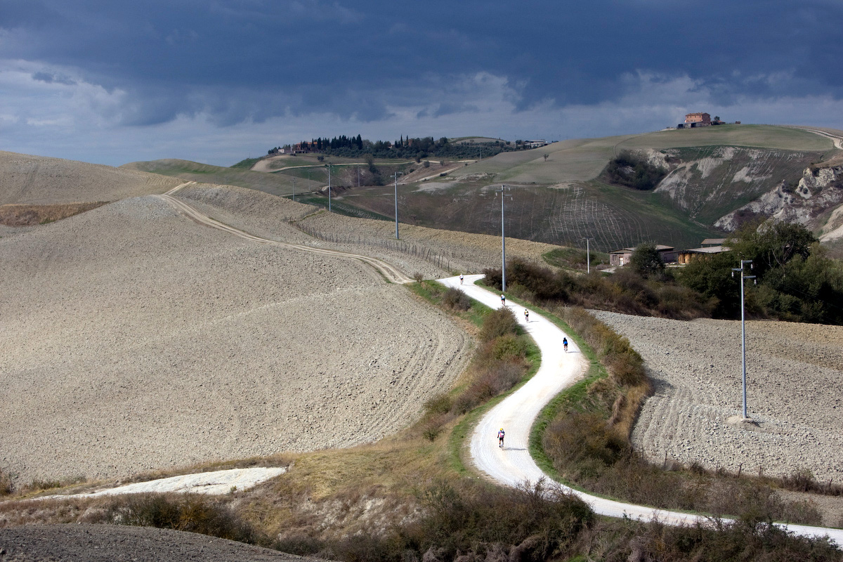 Percorso dell'Eroica : manifestazione cicloturistica che si svolge in provincia di Siena – Italia.